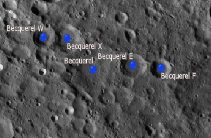 Cráter lunar Becquerel. Cráteres satélite. (Imagen LRO)